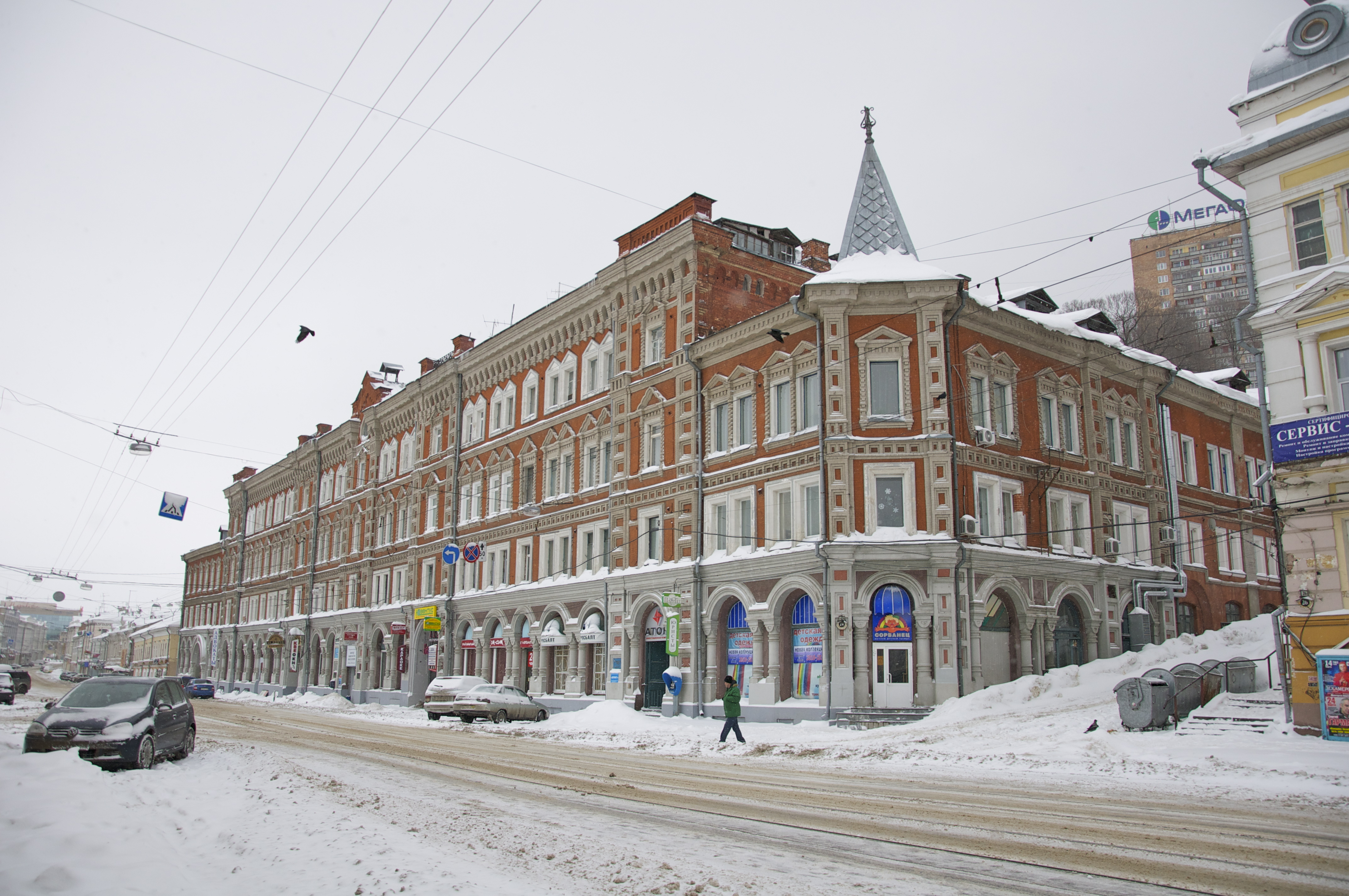 Блиновский пассаж: улица Рождественская, 24, Нижний Новгород, Нижегородская область